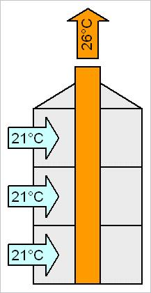 PassiveNachkühlung-Thermik